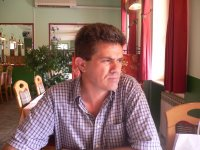 portret autora Žarka Milenića